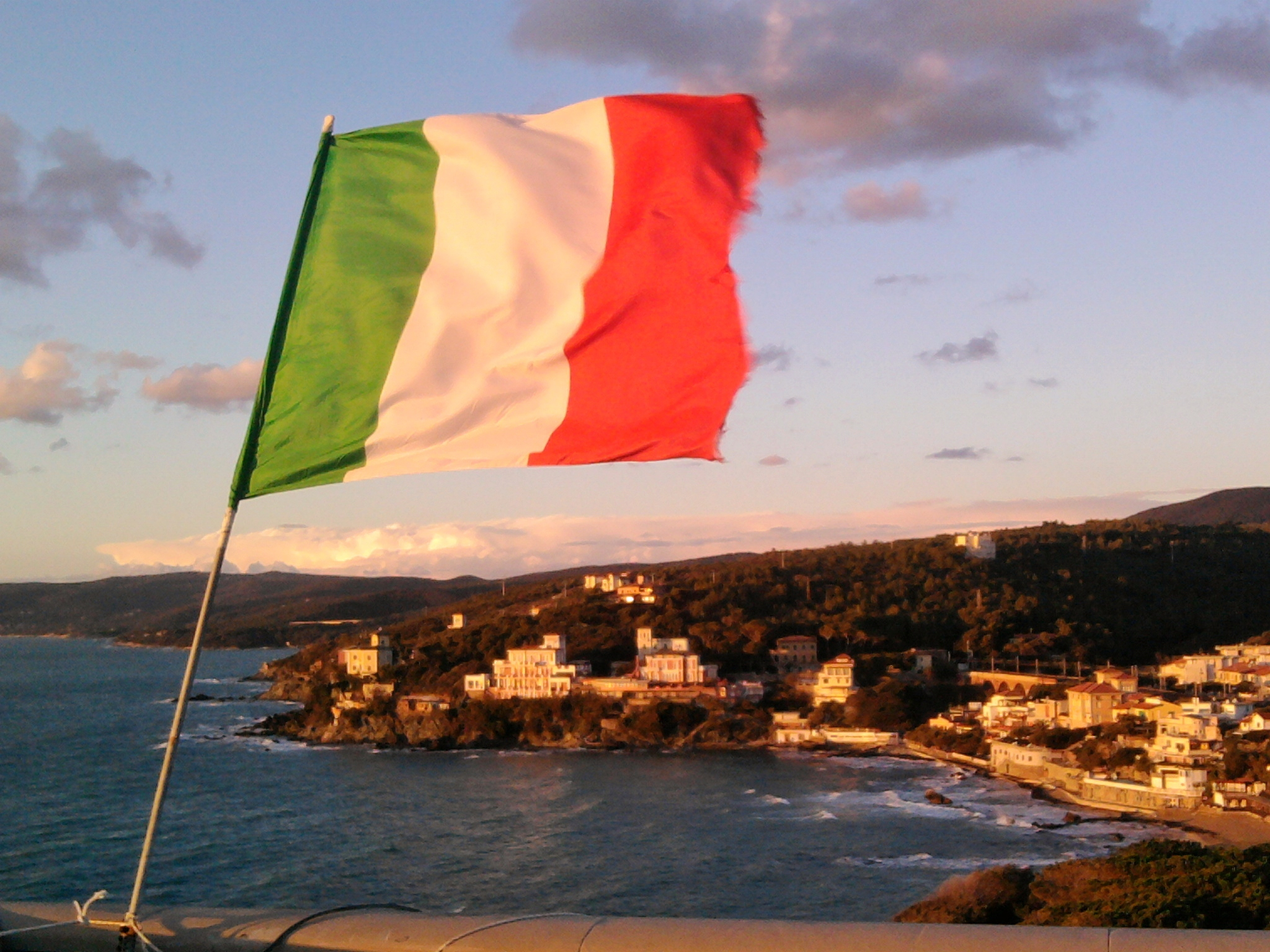 Veduta di Castiglioncello e della costa livornese dalla Torre Medicea di Castiglioncello.